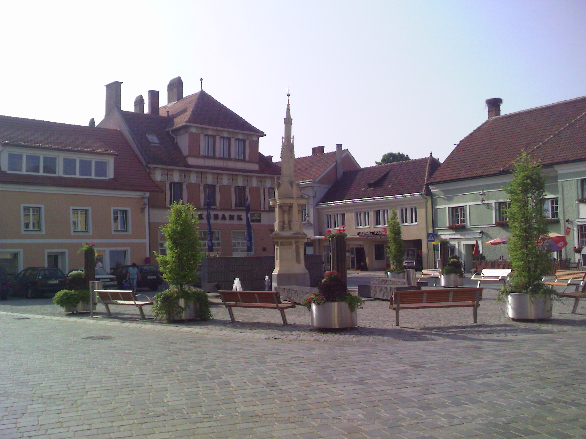 Hauptplatz von Gföhl, fotografiert von der Bushaltestelle aus. Die Gestaltung des Platzes erfolgte 1998-2003 durch Gerhard Mitterberger.